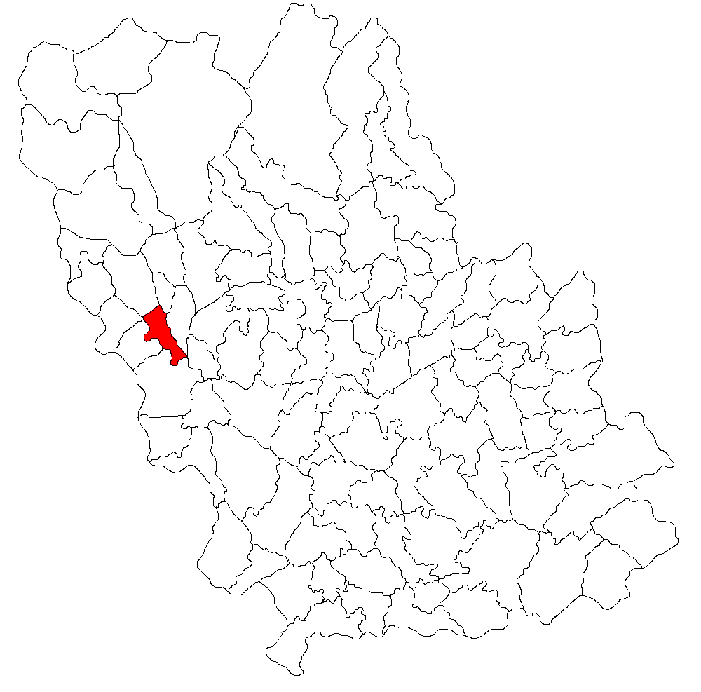 Categorie:Hărţi ale judeţului Prahova